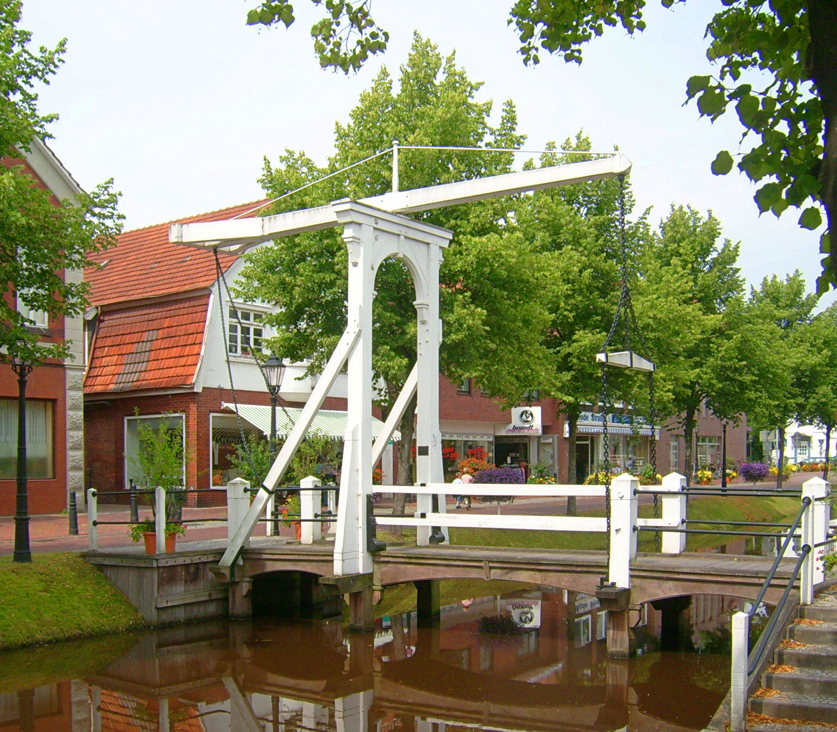 Zugbrücke in Papenburg